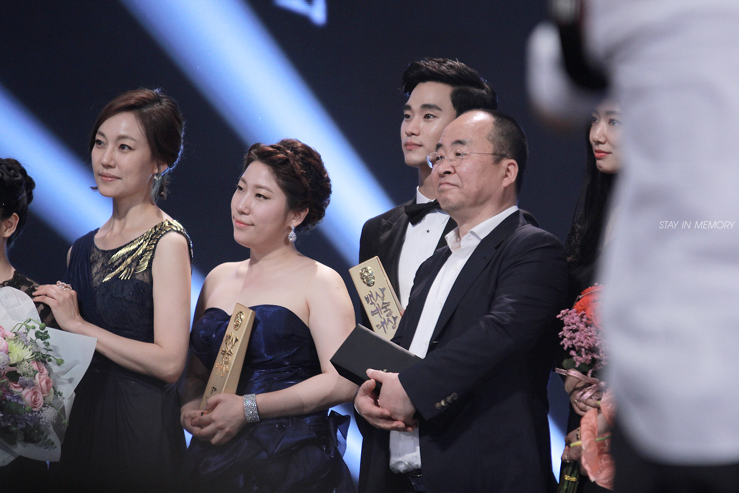 2014 백상예술대상.